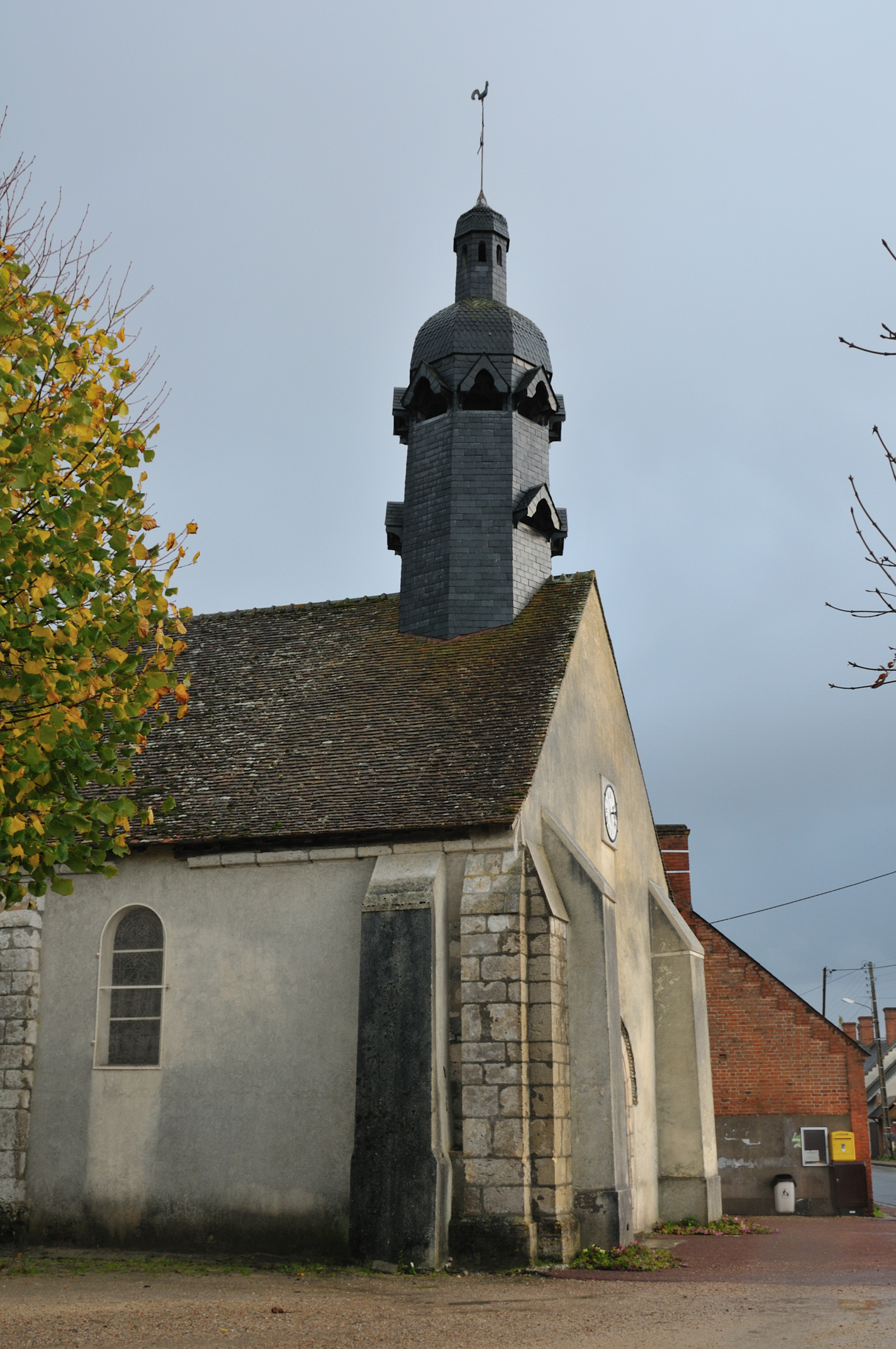 Église Saint-Pierre, La Marolle-en-Sologne, Loir-et-Cher, France